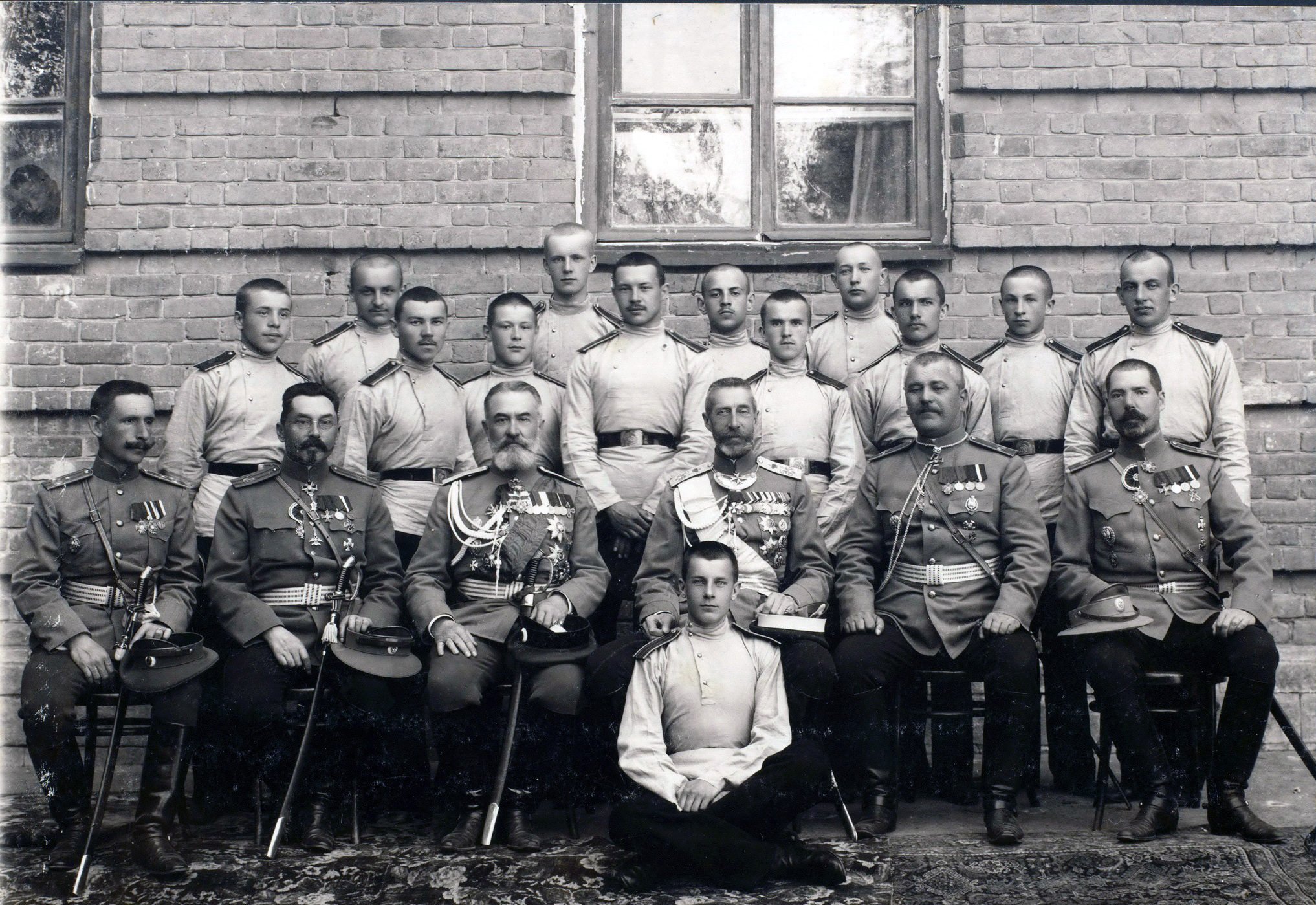 Вольский кадетский корпус (май 1914 года): 17 мая 1914 г. Группа кадет (все двенадцать выпускников 1914 года) и преподавателей корпуса с ВК Константином. Слева от ВК - генерал Забелин Александр Федорович, справа - директор корпуса Бородин Михаил Павлович